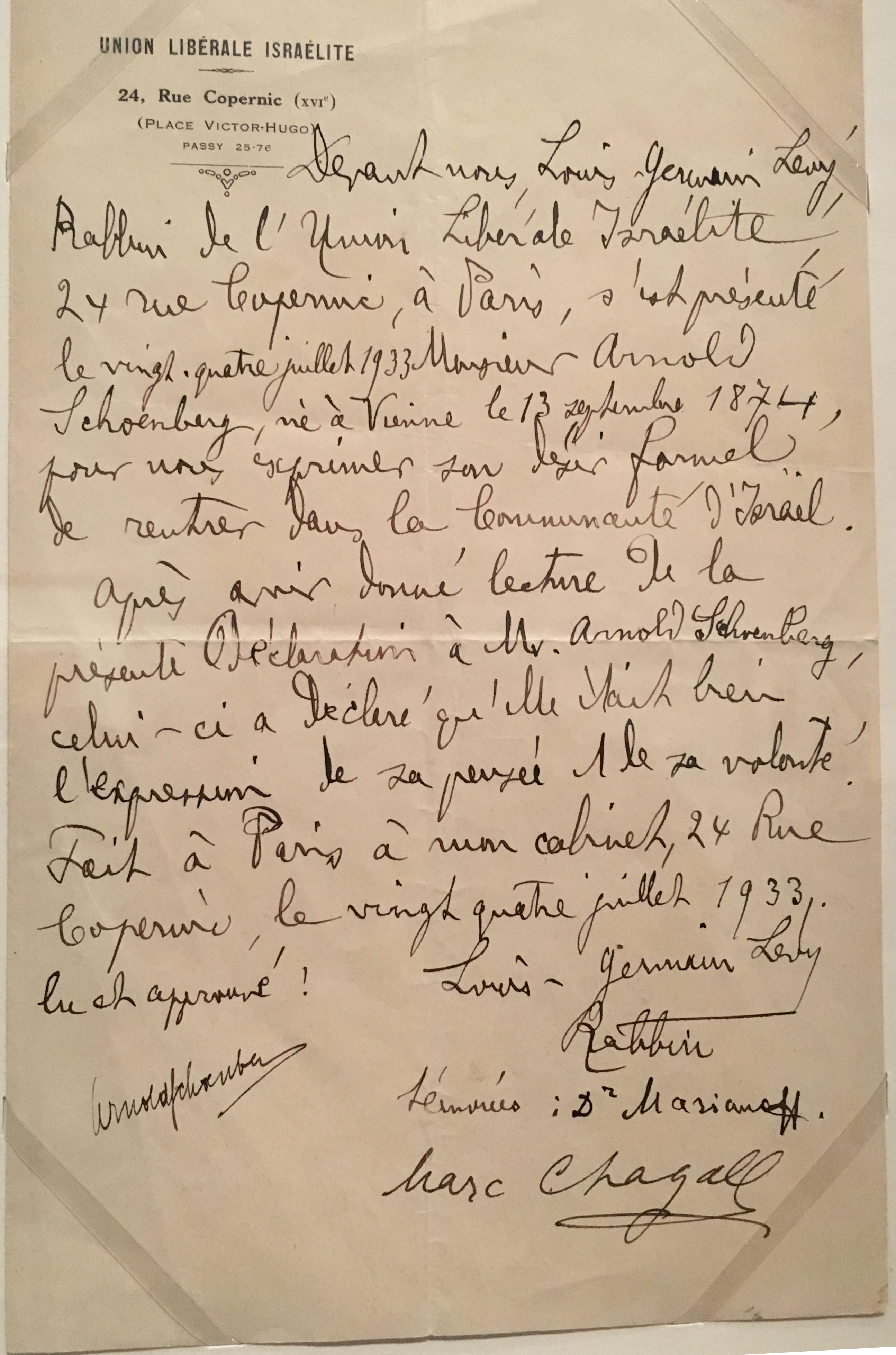 Document attestant la retour au judaïsme d'Arnold Schönberg le 24 juillet 1933, Marc Chagall et le docteur Marianoff, mari de la belle-fille d'Albert Einstein, étant témoins - document présenté au Musée d'Art et d'Histoire du Judaïsme lors de l'exposition consacrée à Arnold Schönberg en novembre 2016